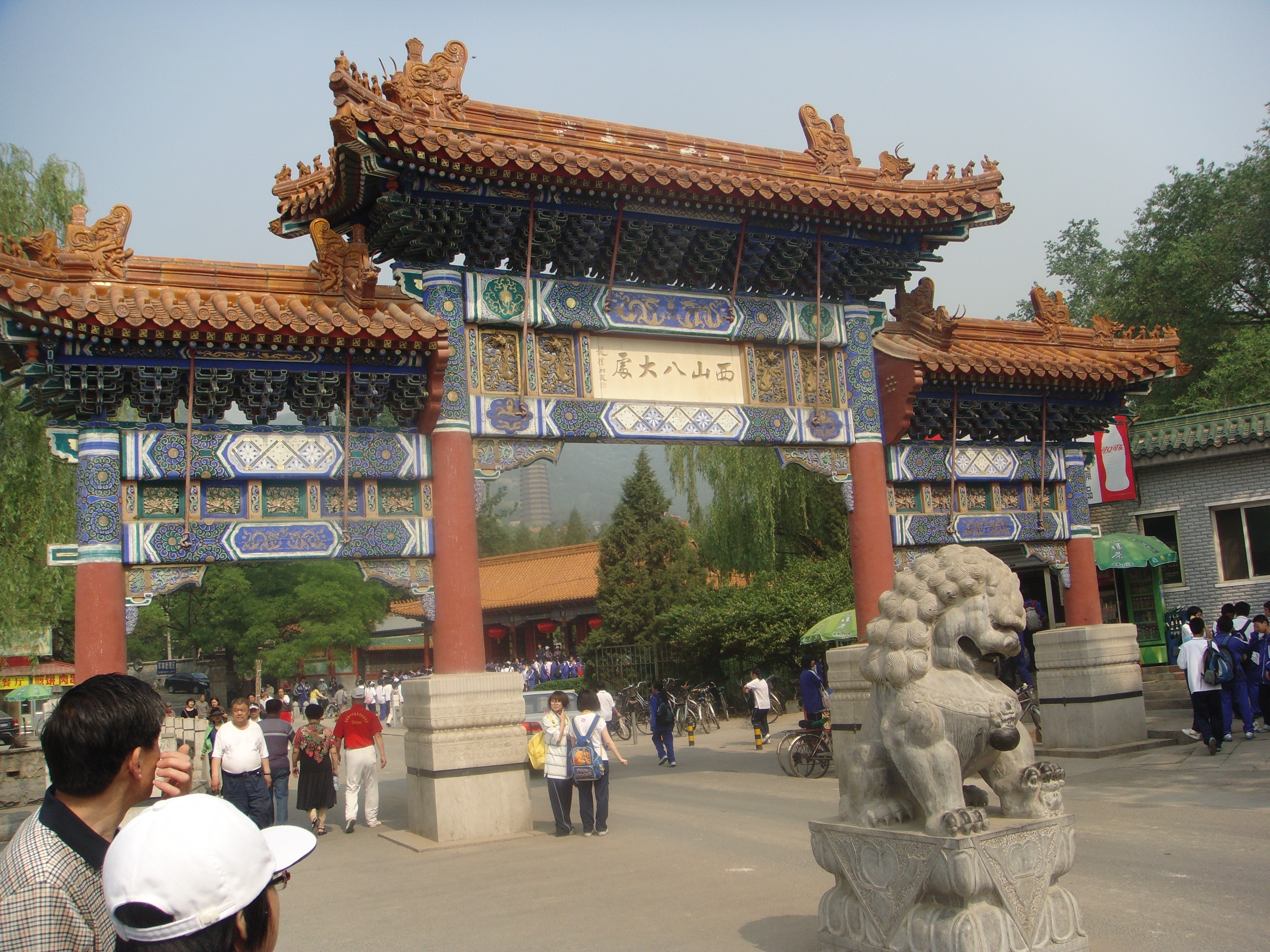 八大处 入口